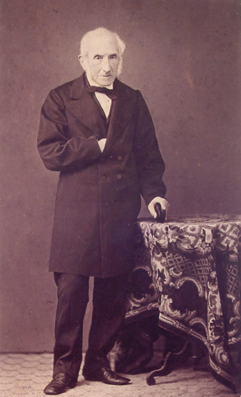 Alessandro Manzoni (1785-1873)